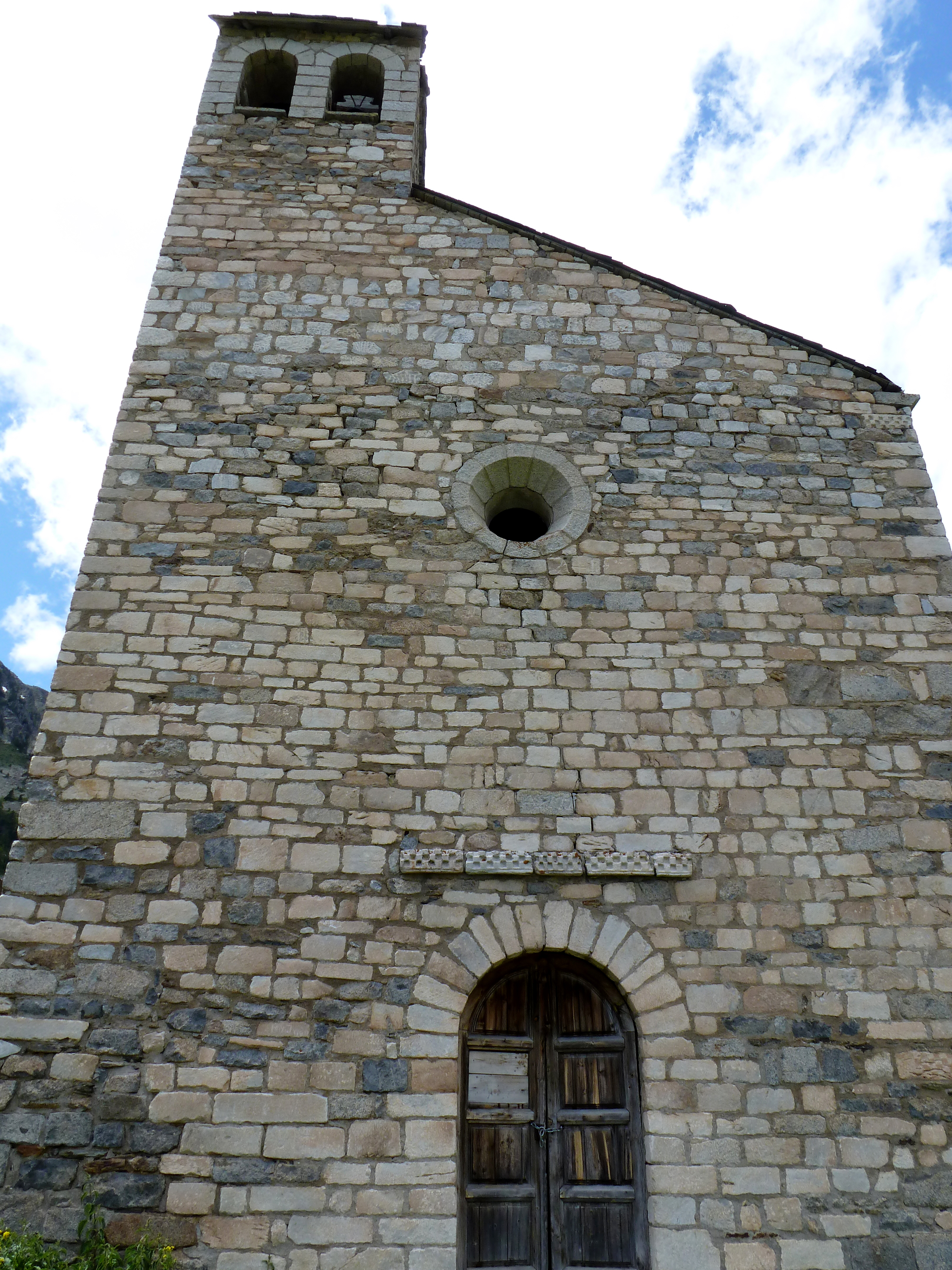 Façana SE del Santuari de la Mare de Déu de les Ares, construït el segle XX aprofitant les restes de l'antiga església.